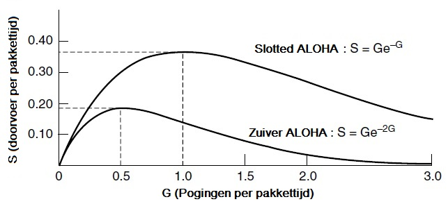 Doorvoercapaciteit versus aangeboden dataverkeer voor ALOHA-systemen.